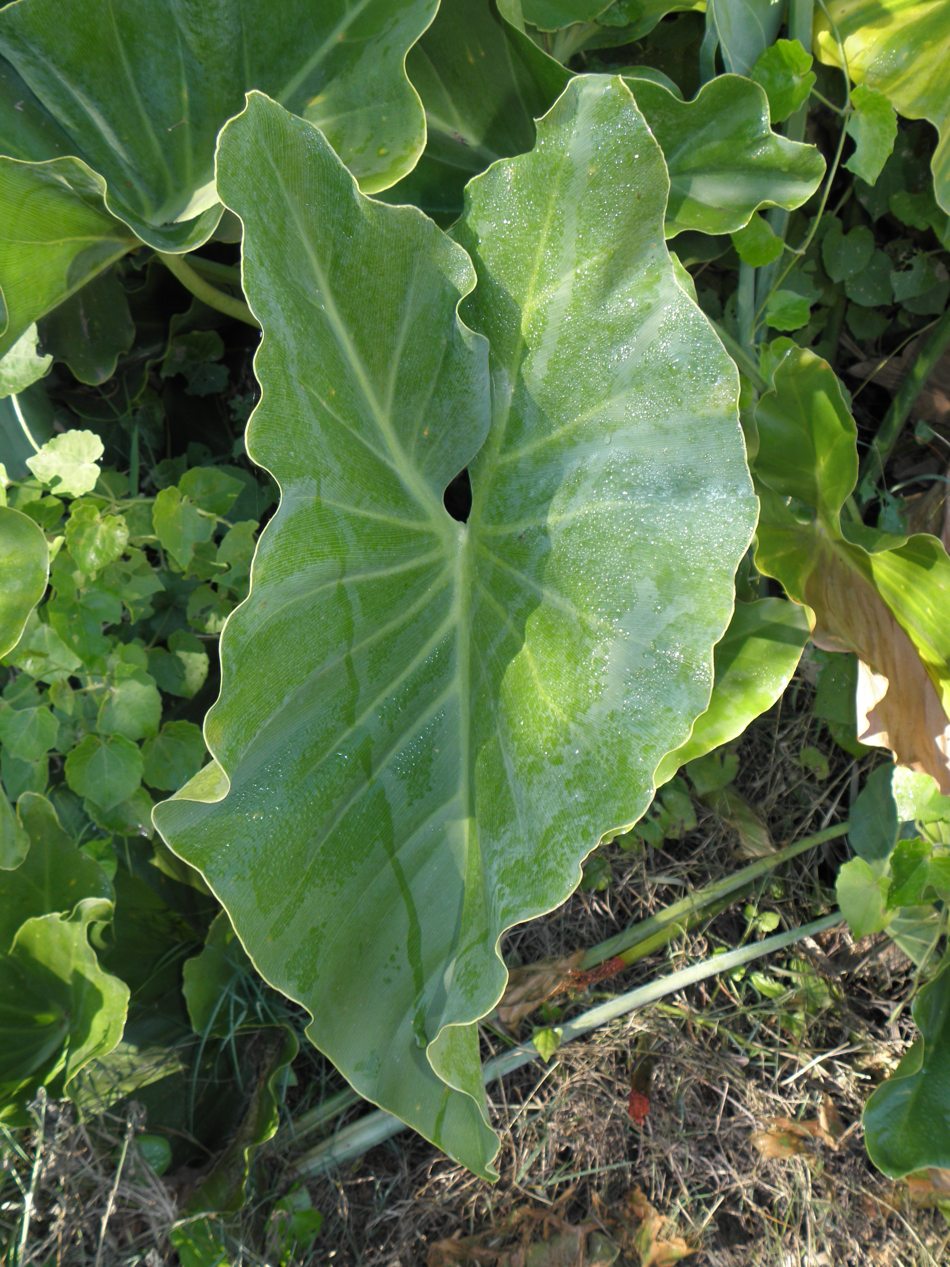 Philodendron tweedianum.